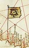 Carte.